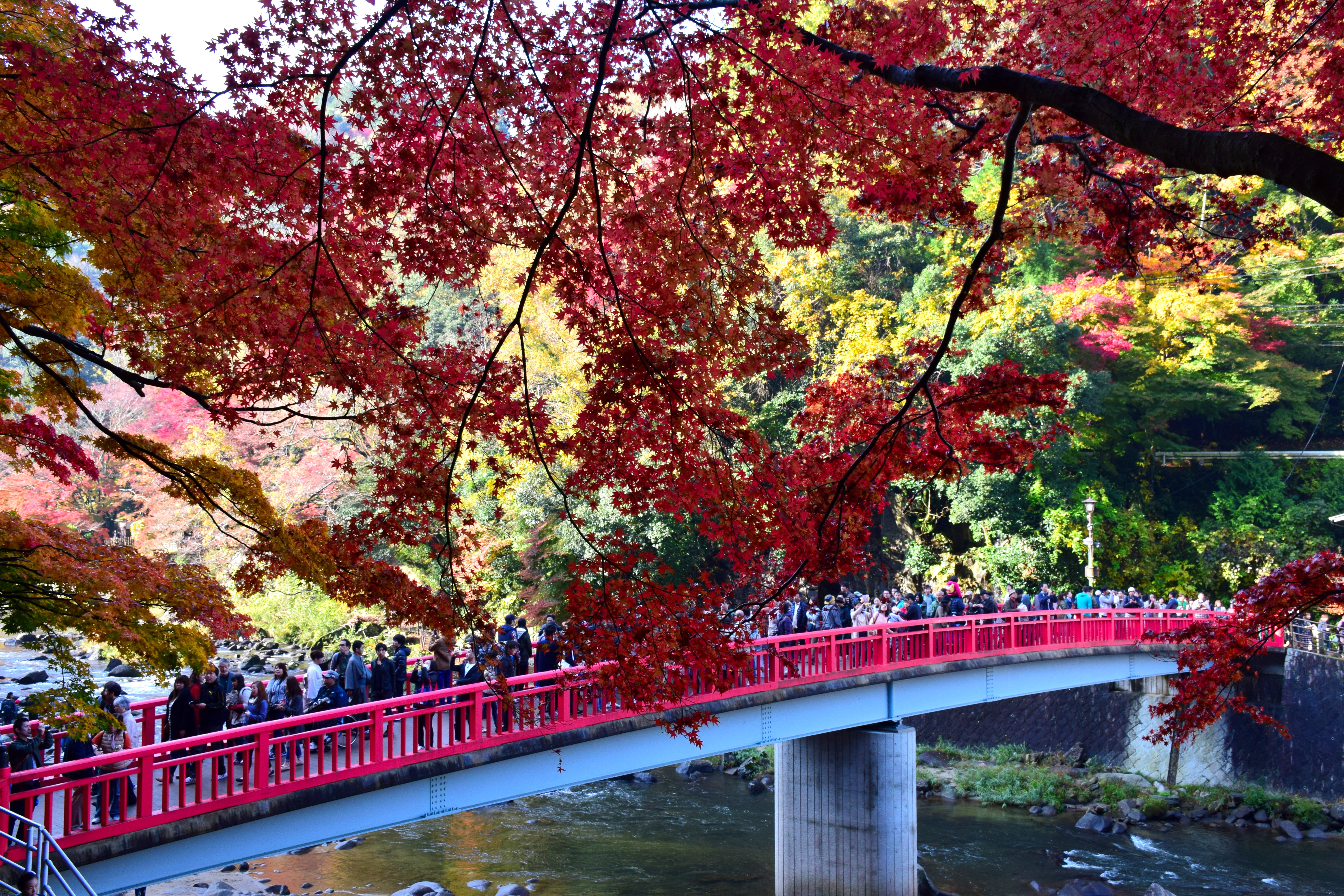 待月橋と紅葉